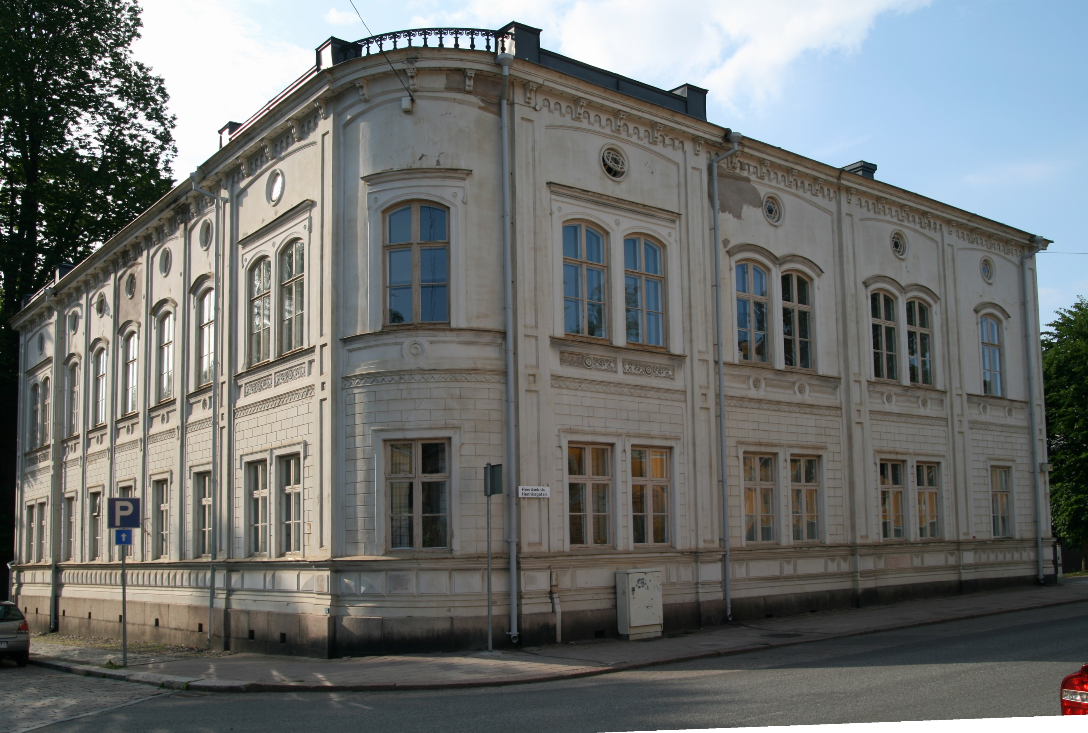 Åbo Akademi's building Reuterska huset/Kursboksbiblioteket